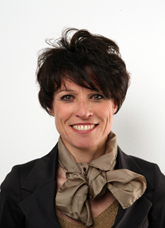 Manuela Di Centa eletta alla Camera